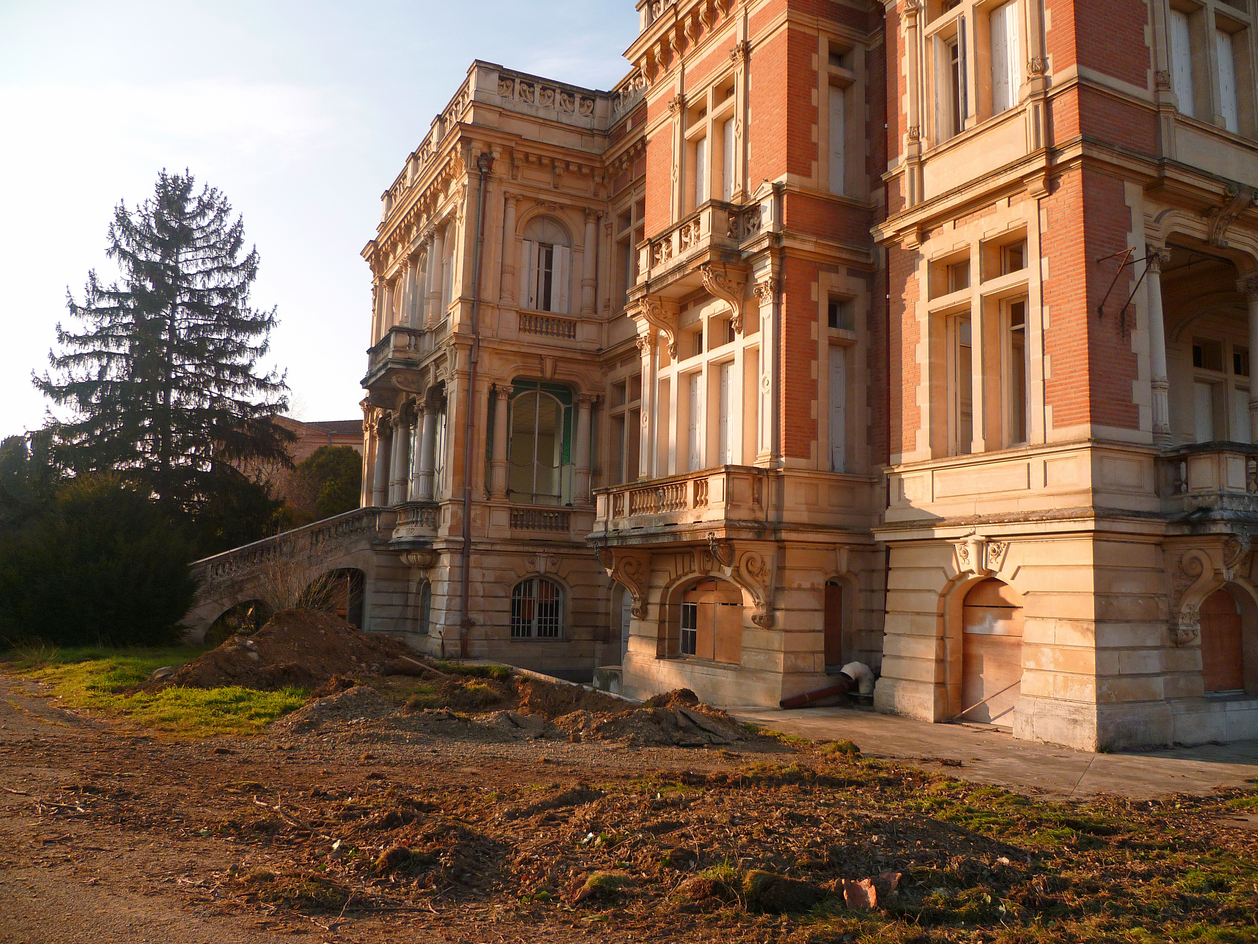 Colomiers (Haute-Garonne, Midi-Pyrénées, France) : Le château du Cabirol. Ancienne propriété de la clinique du Cabirol, il est transformé en immeuble d'appartements.